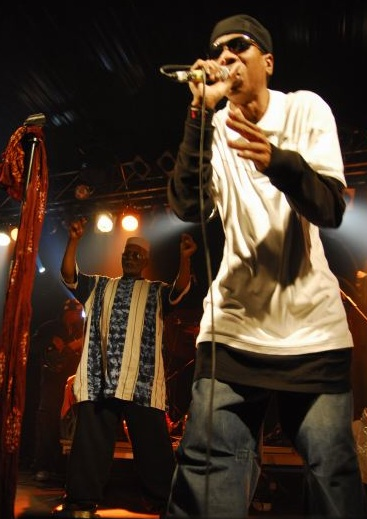 Arrested Development live in München, Deutschland.